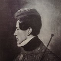 Détail sur la tête du peintre